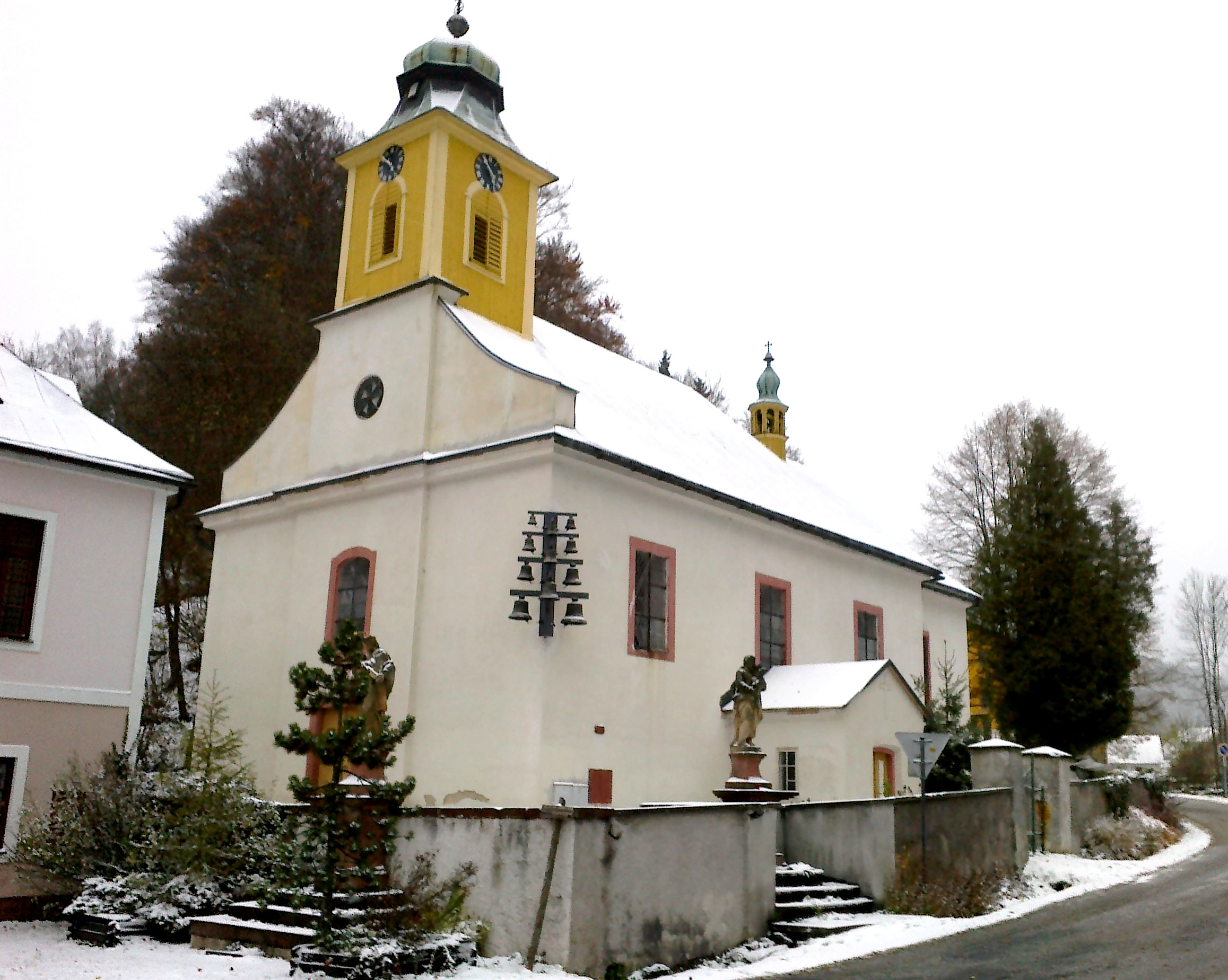 Dolní Dvůr - kostel sv. Josefa